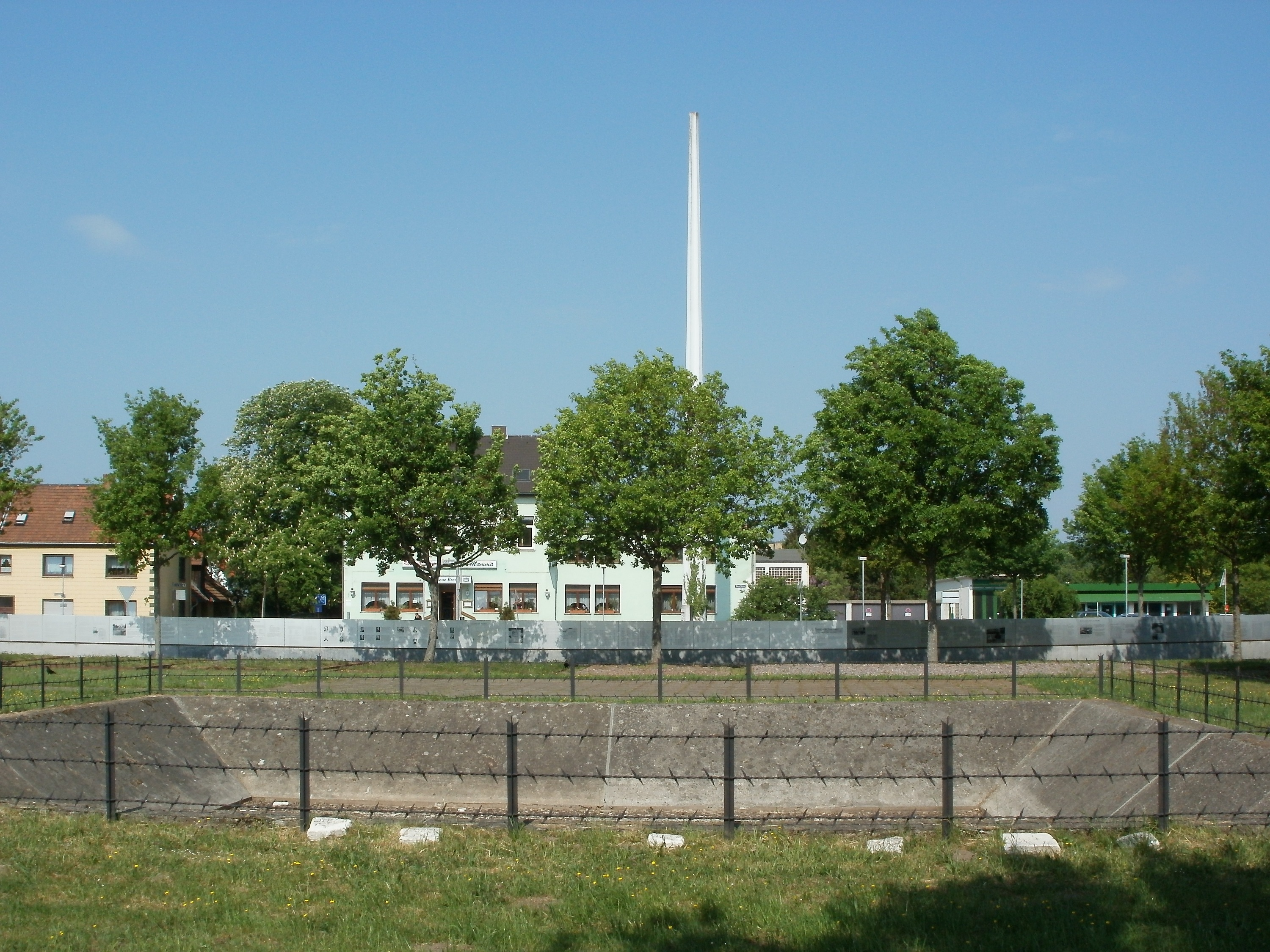 Gestapo-Lager Neue Bremm (Saarbrücken)